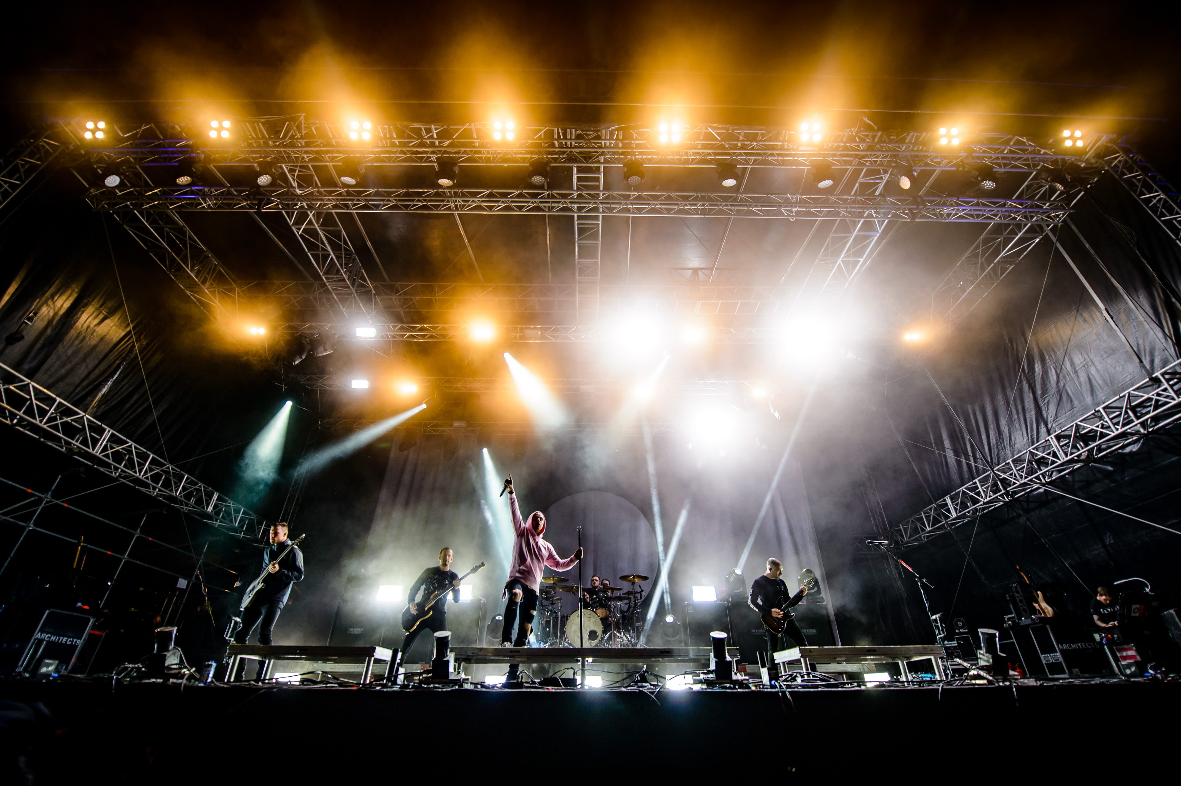 'Summer Breeze Festival 2017; Dinkelsbühl': 'Architects'